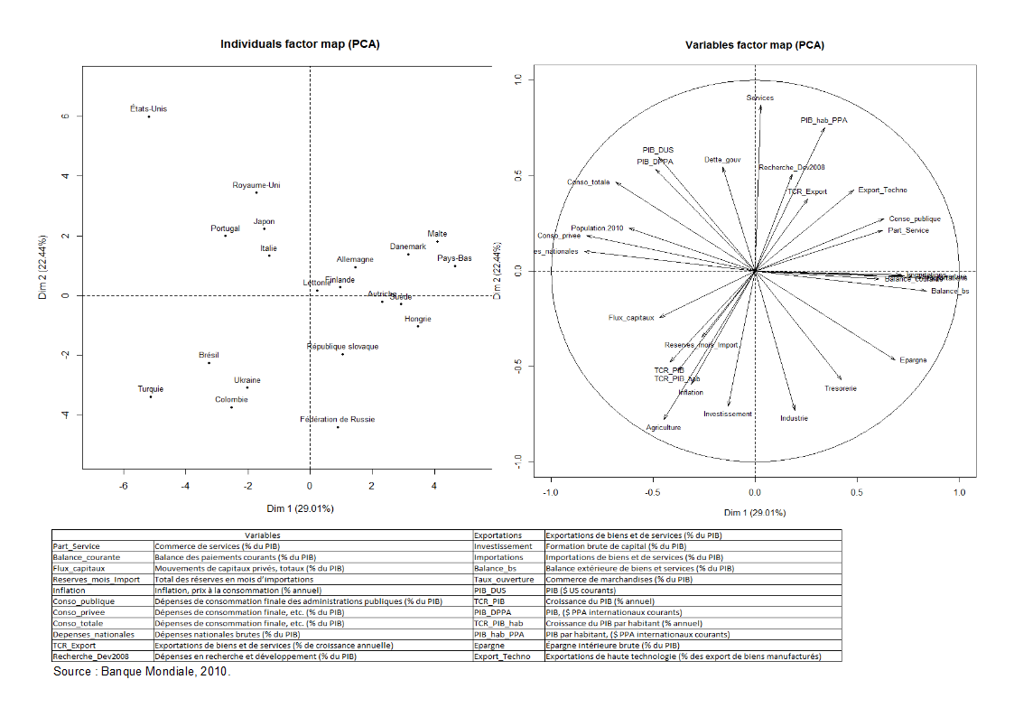 Analyse en Composantes Principales - Source: Banque Mondiale